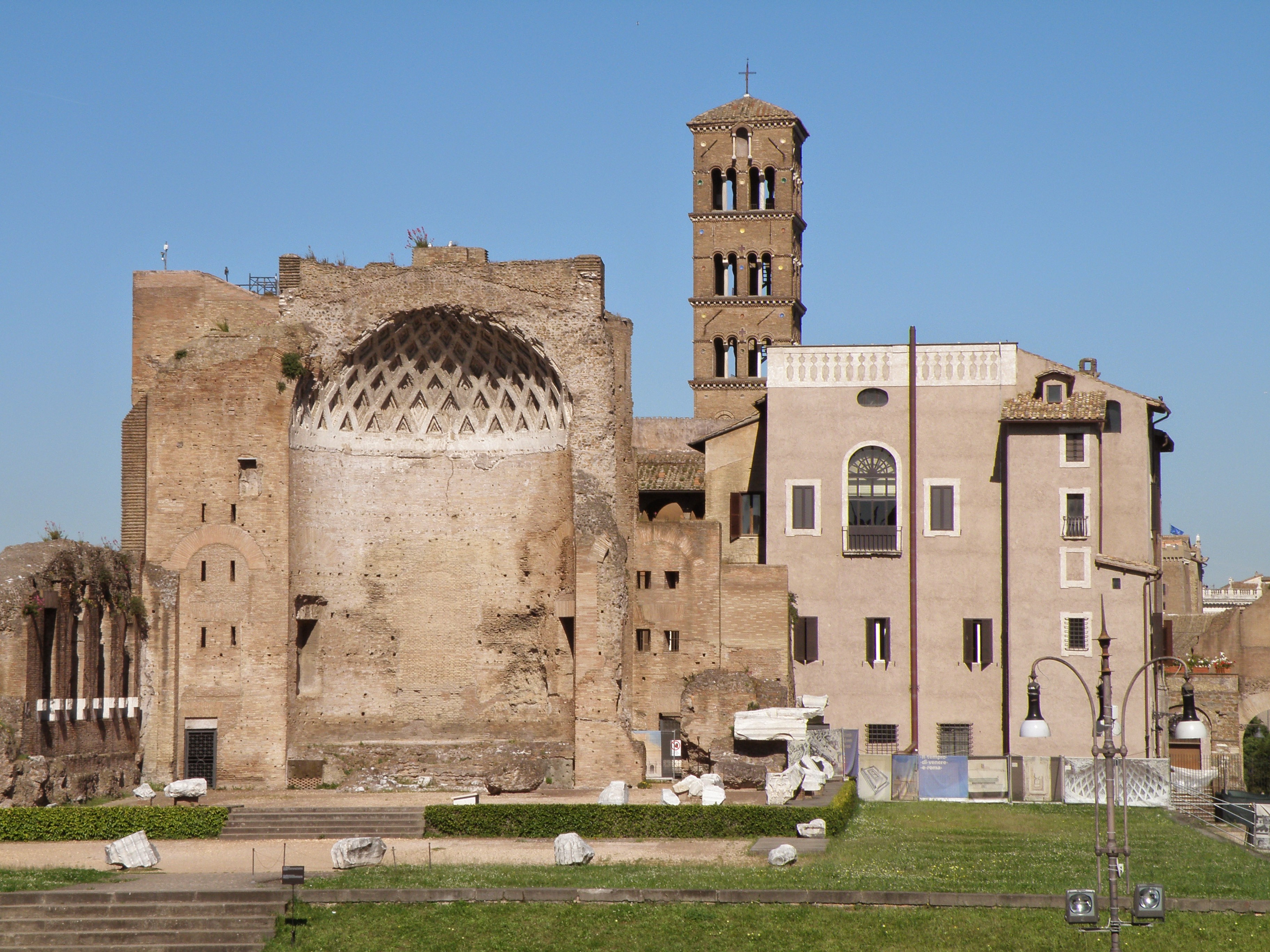 Rione XIX Celio, Roma, Italy